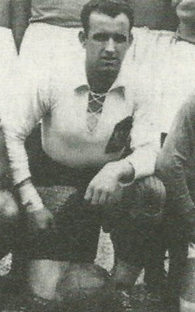 Maksimilijan Mihelčič